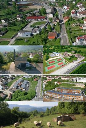 Lavans-lès-Saint-Claude